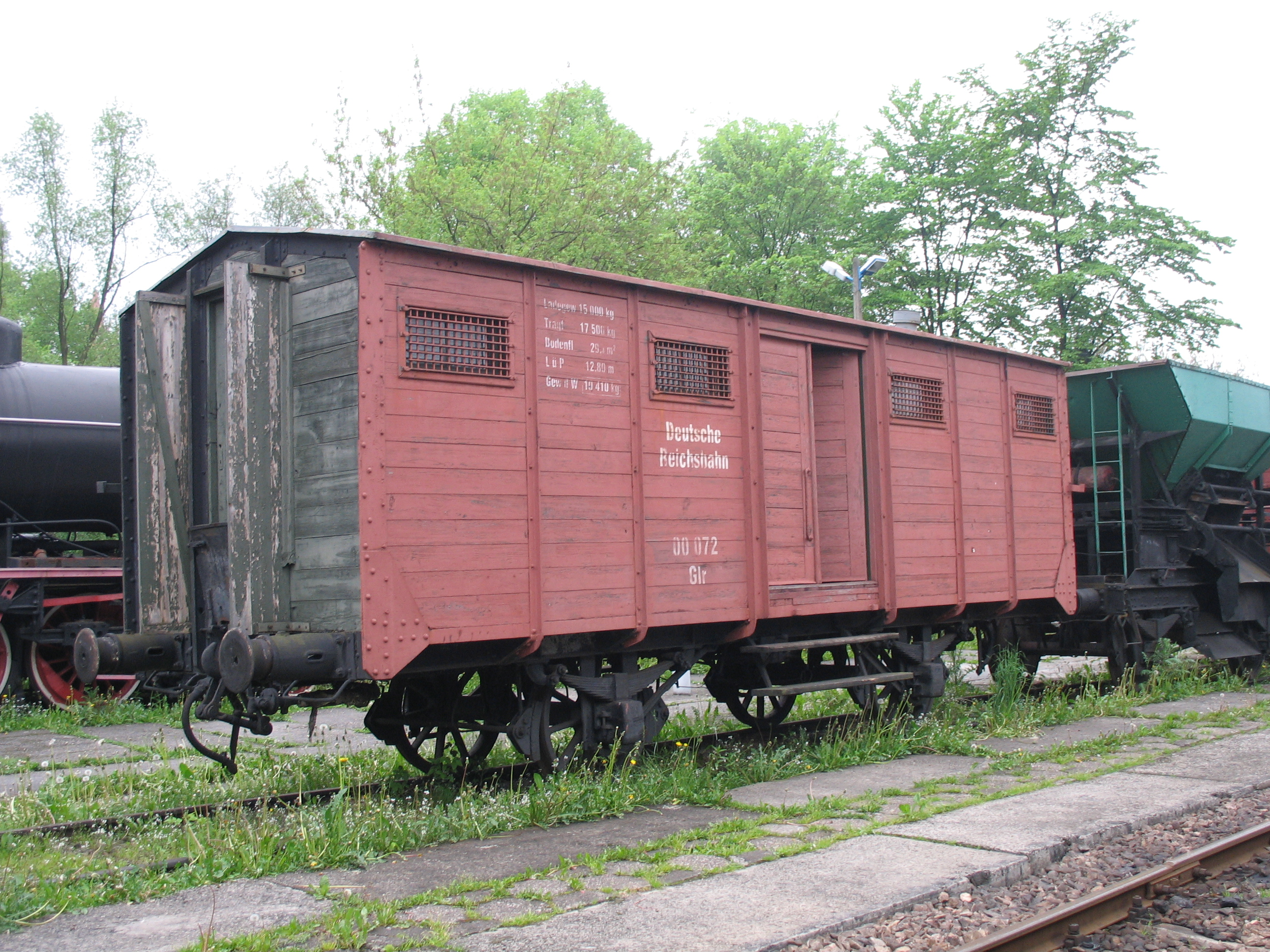 Wagon kolejowy typu Glr numer 00 072. Eksponat skansenu taboru kolejowego w Chabówce